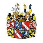 Kurck-suvun vaakuna